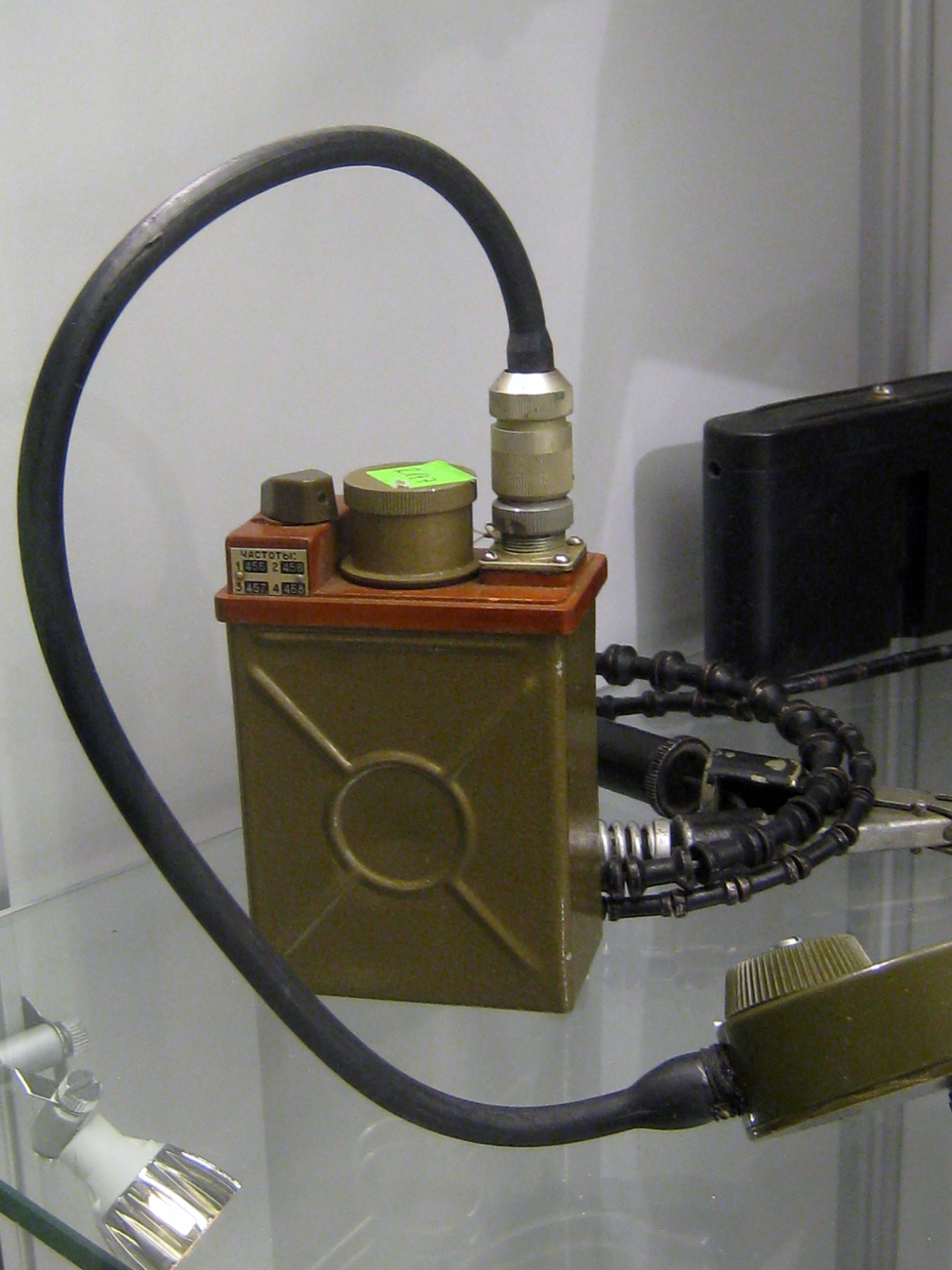 Sowjetische militärische Funkstelle R-147 (mit Kulikow-Antenne) Festungsmuseum Reuenthal.